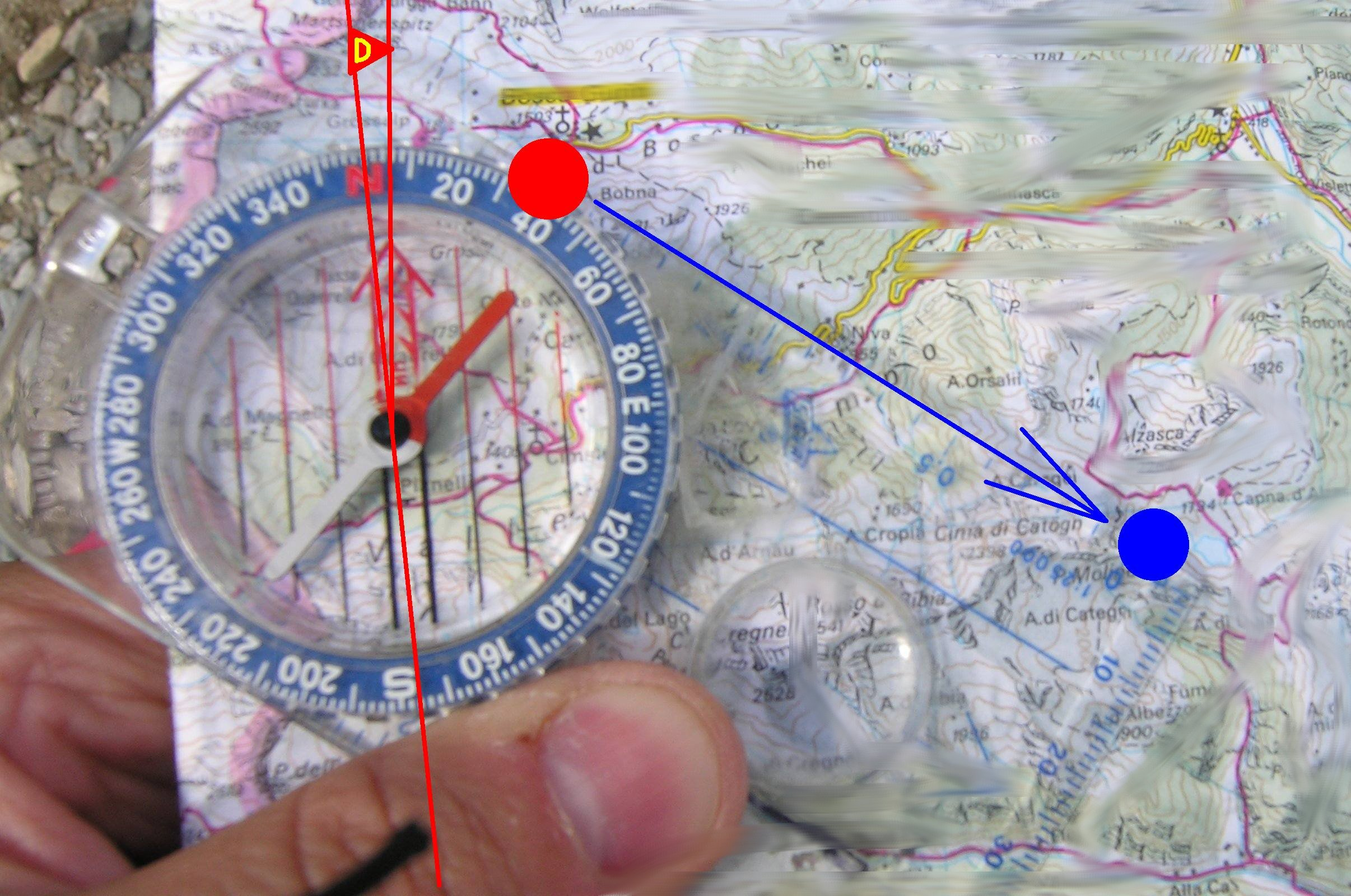 Compass usage illustration